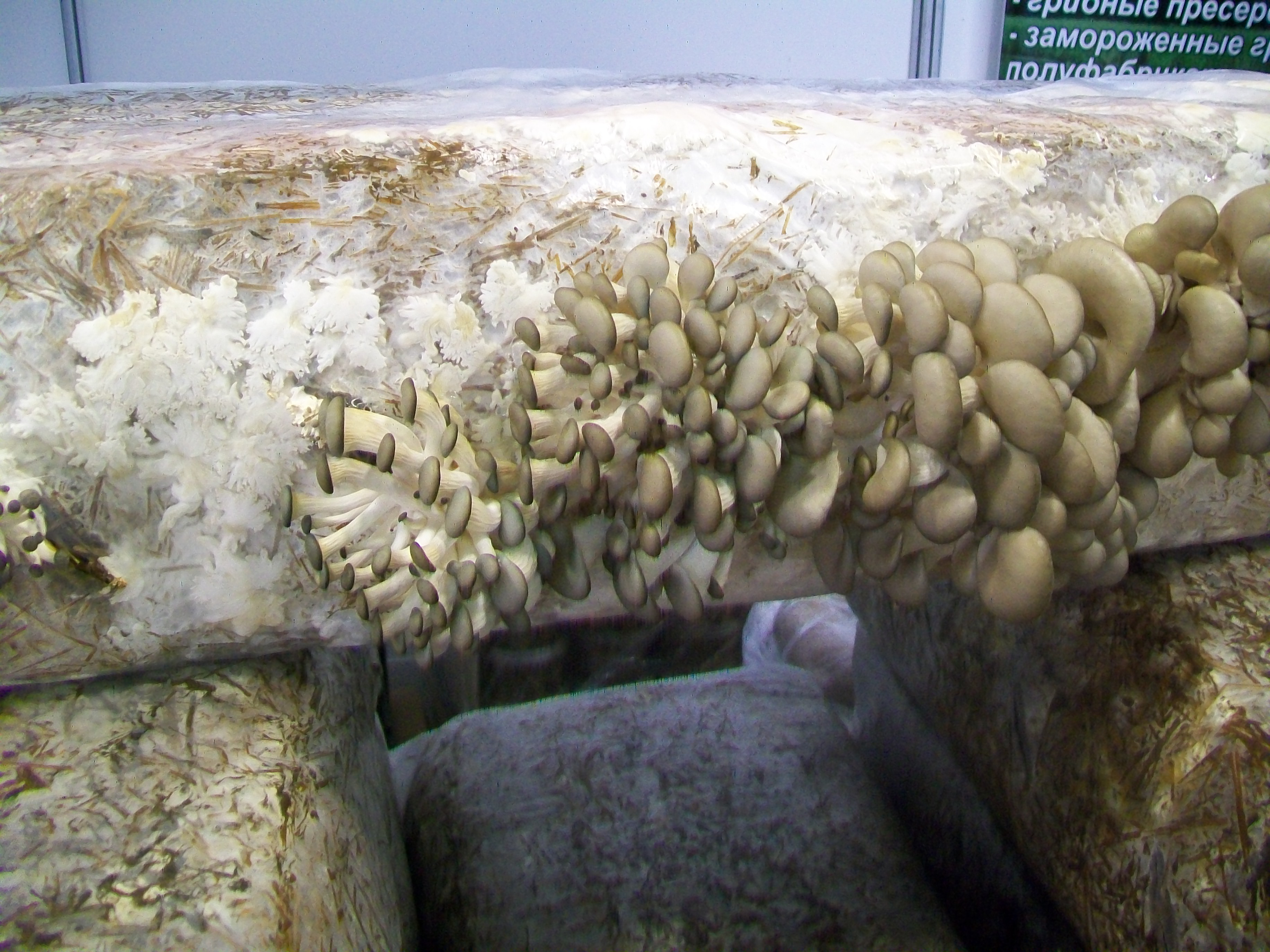 Пример культивирования вешенки на соломе. Фото сделано на выставке-форуме "Экология. Человек. Здоровье". в ДИВСе Екатеринбурга, 23 марта 2017 года